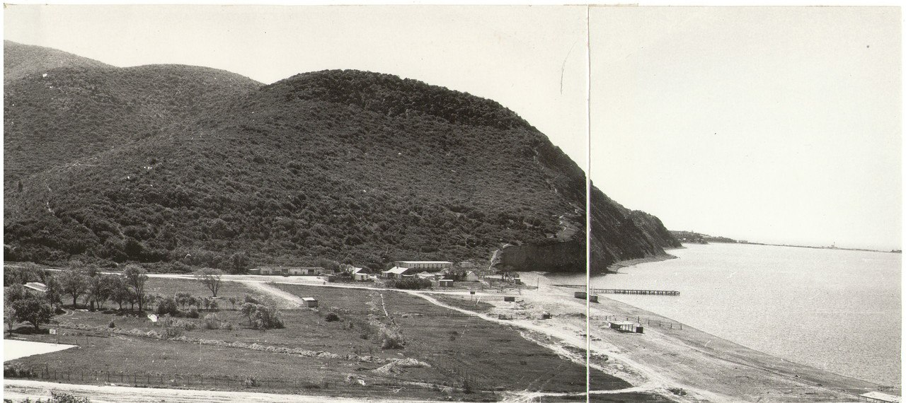 первая территория ВДЦ "Смена"